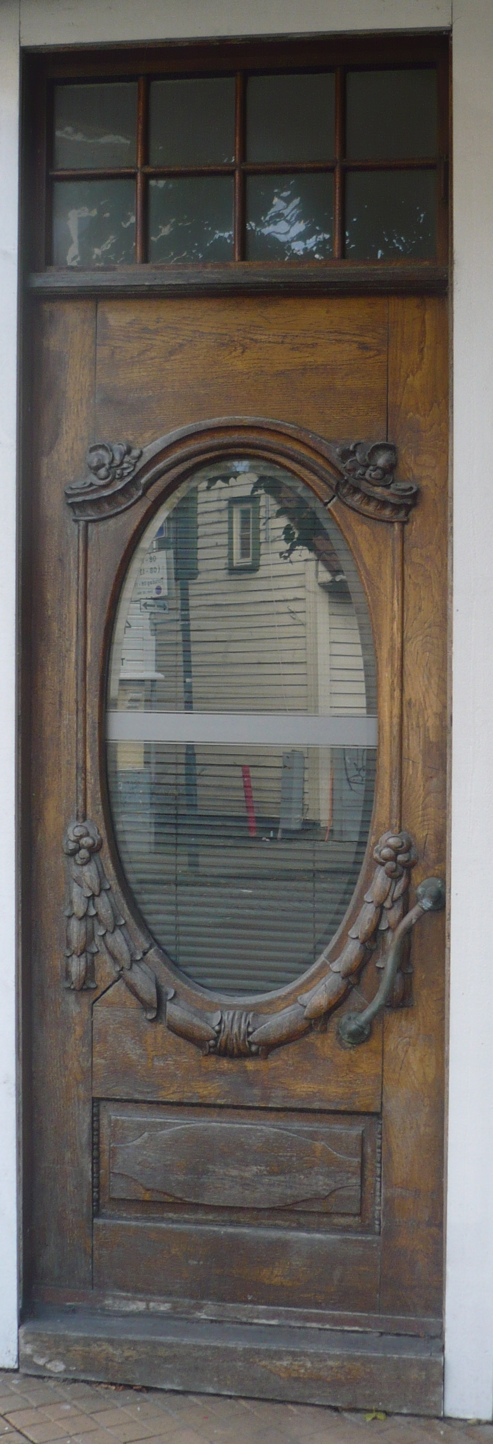 Døra inn til den tidligere fiskebutikken til Sleveland i Pedersgata i Stavanger.